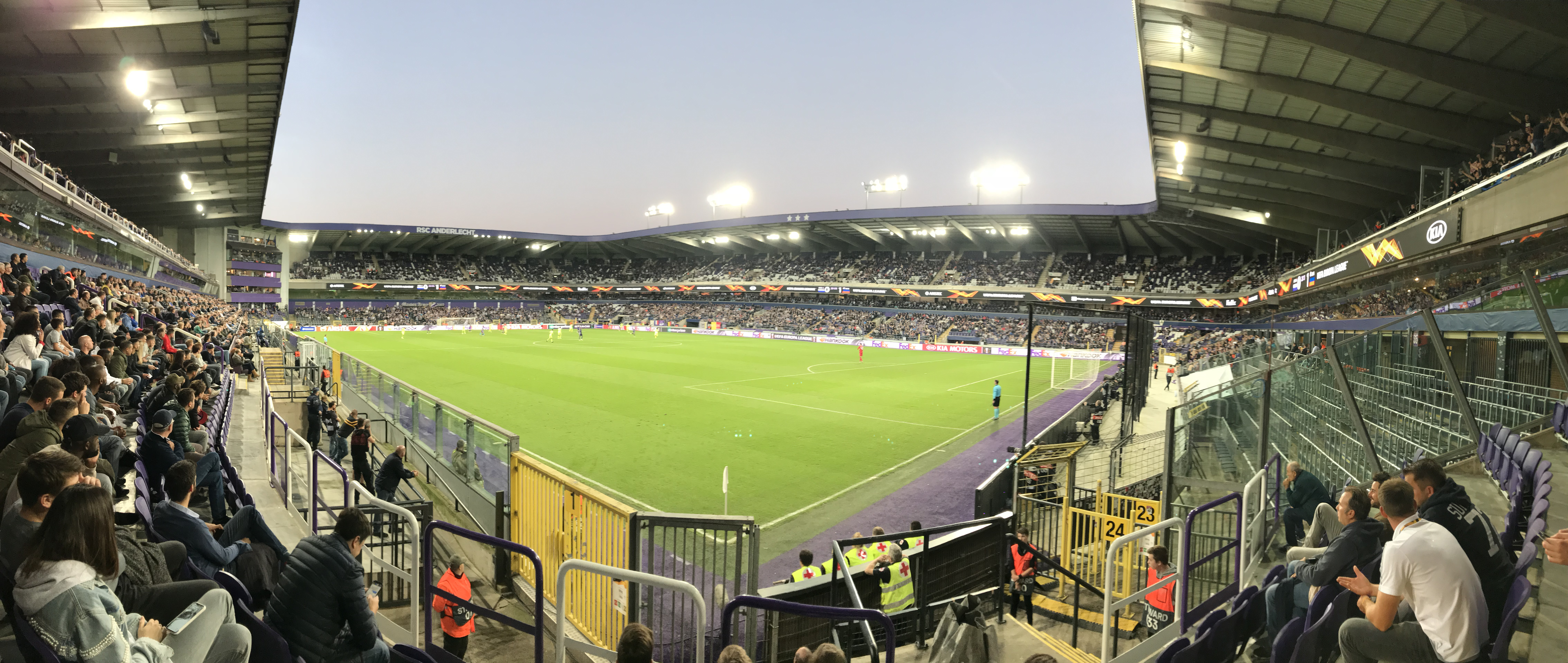 Constant Vanden Stockstadion, Europa League: Anderlecht - Dynamo Zagreb (0-2) 4/10/2018